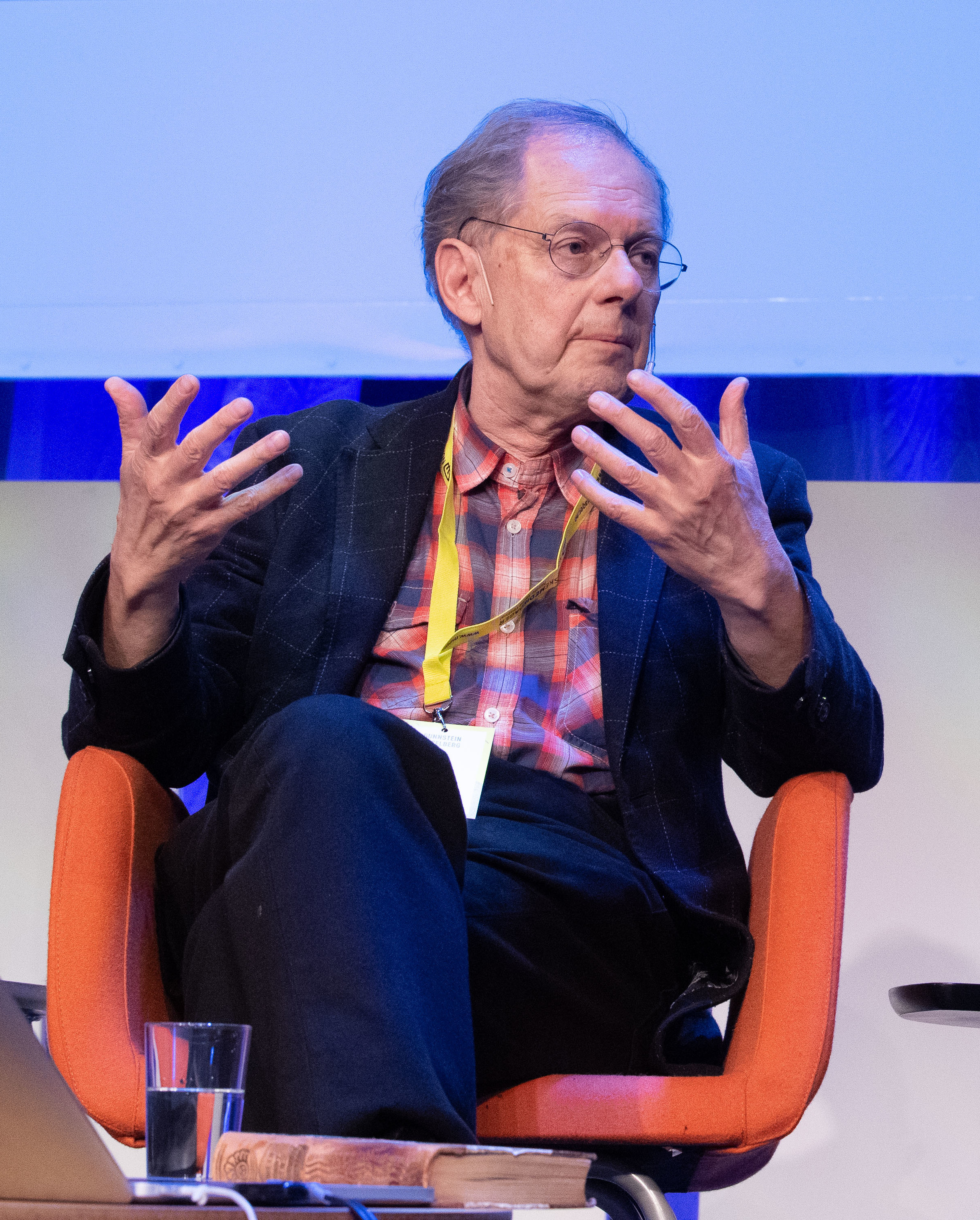 Linda Eides mediespråksjov